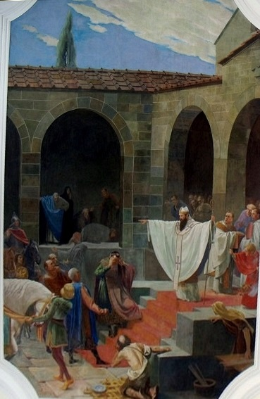 Hergensweiler, Kirche St. Ambrosius, Deckengemälde: Bischof Ambrosius verwehrt Kaiser Theodosius den Zugang zur Kirche als Buße für das Massaker von Thessaloniki von Gebhard Fugel